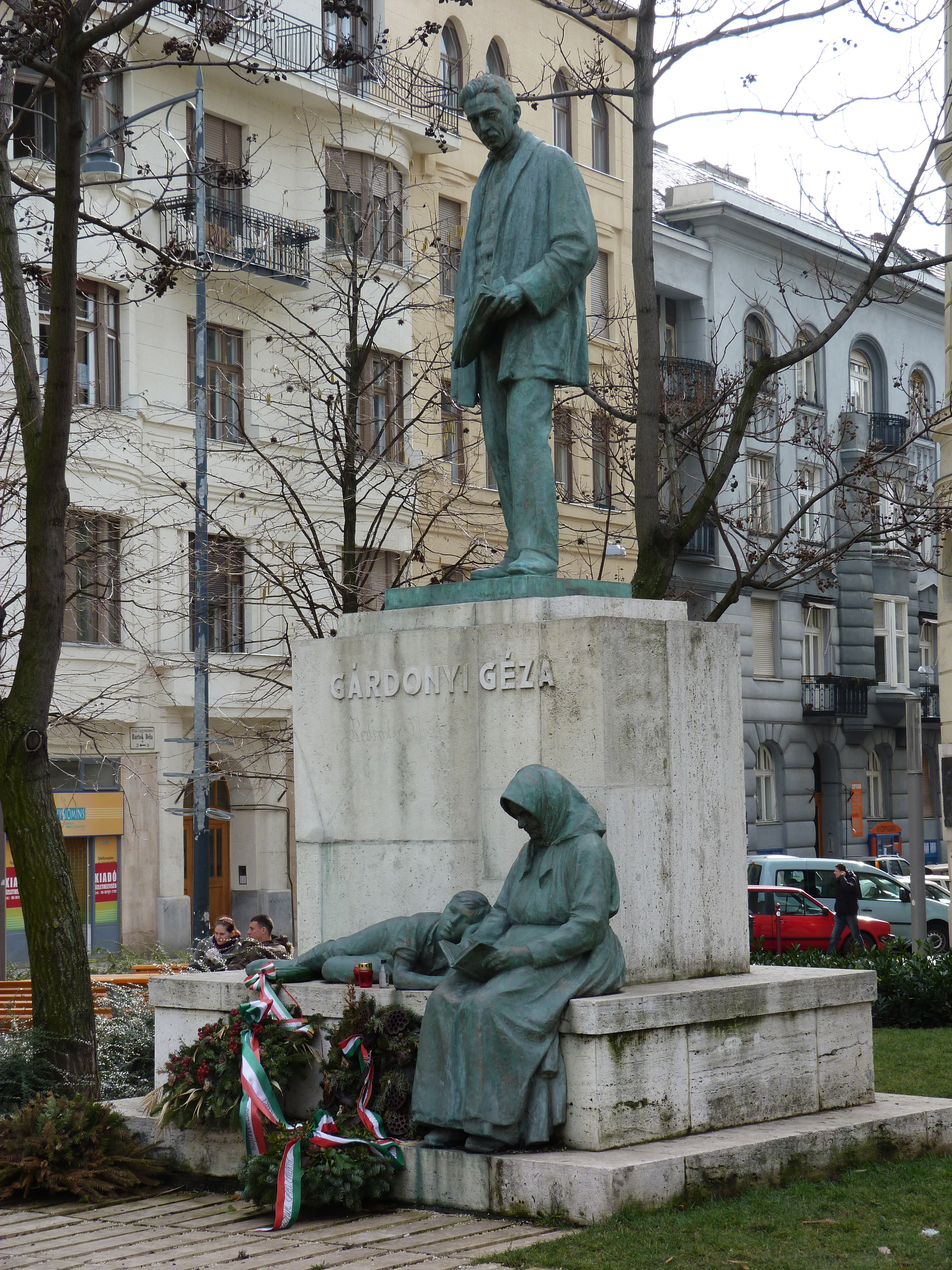 A felvétel 2013. február 26 -án készült Budapesten, Újbudán. Gárdonyi Géza szobra a róla elnevezett téren.